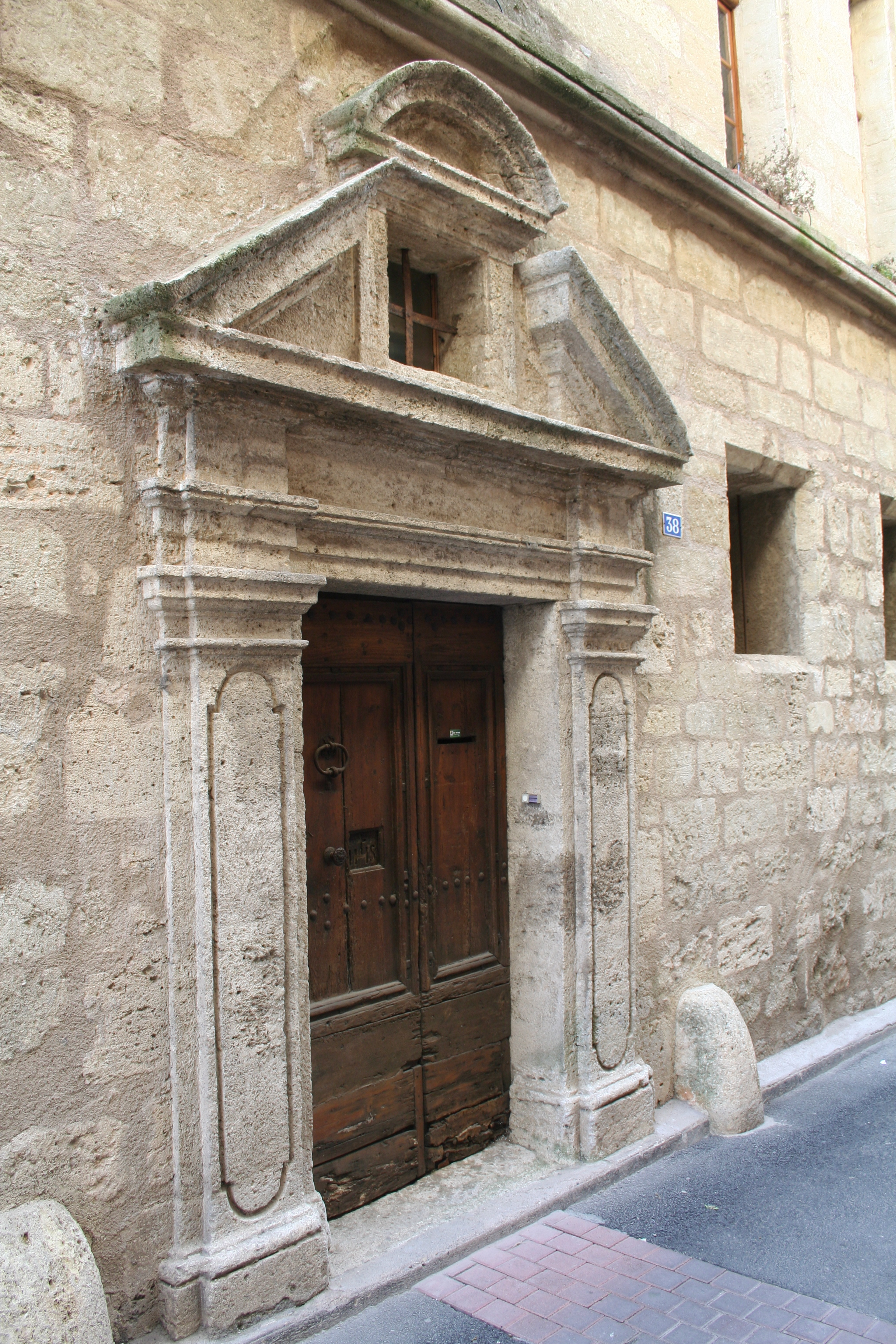 Montagnac (Hérault) - Hôtel de Rat - porte 1.